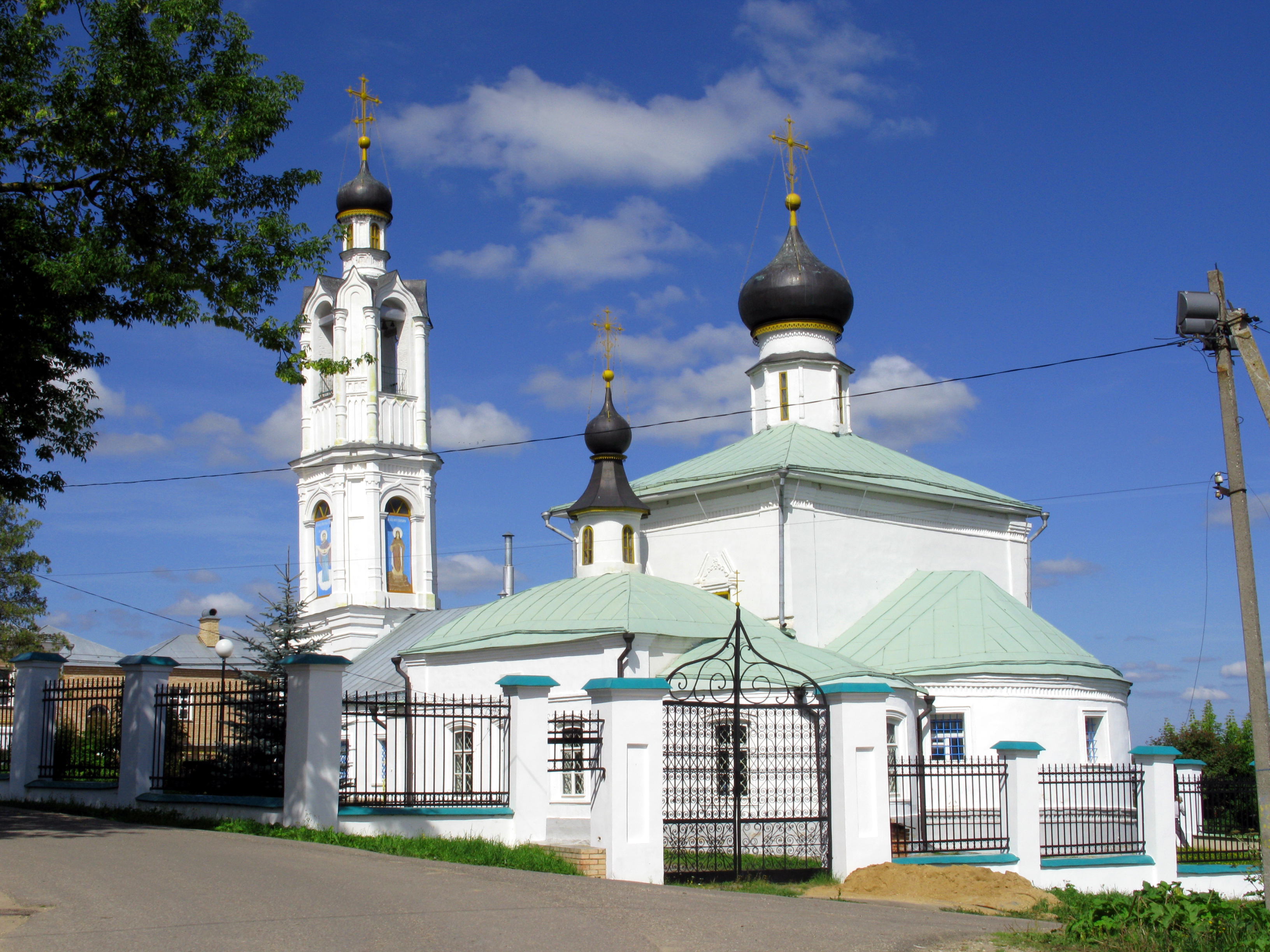 Храм Покрова Пресвятой Богородицы (Волоколамск)